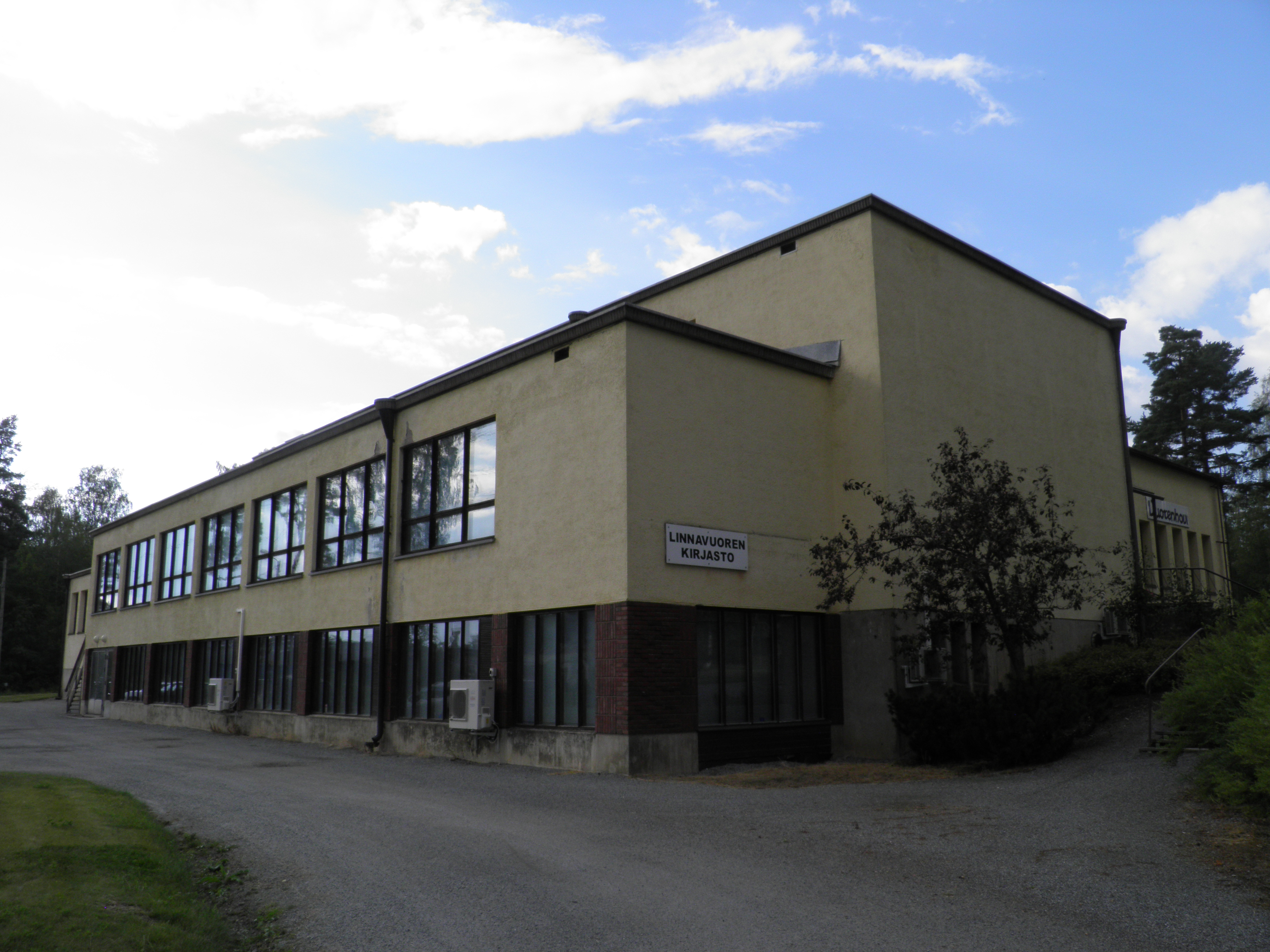 Nokian Linnavuoren kirjasto.